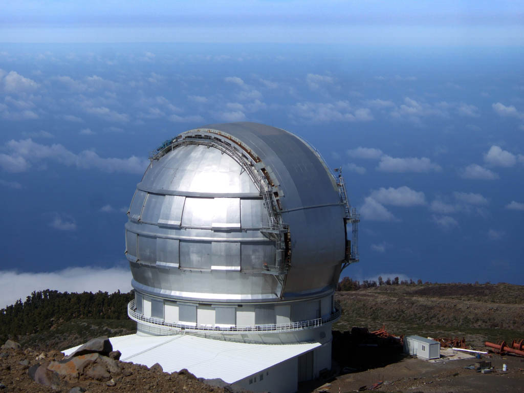 Observatorio del Roque de los Muchachos